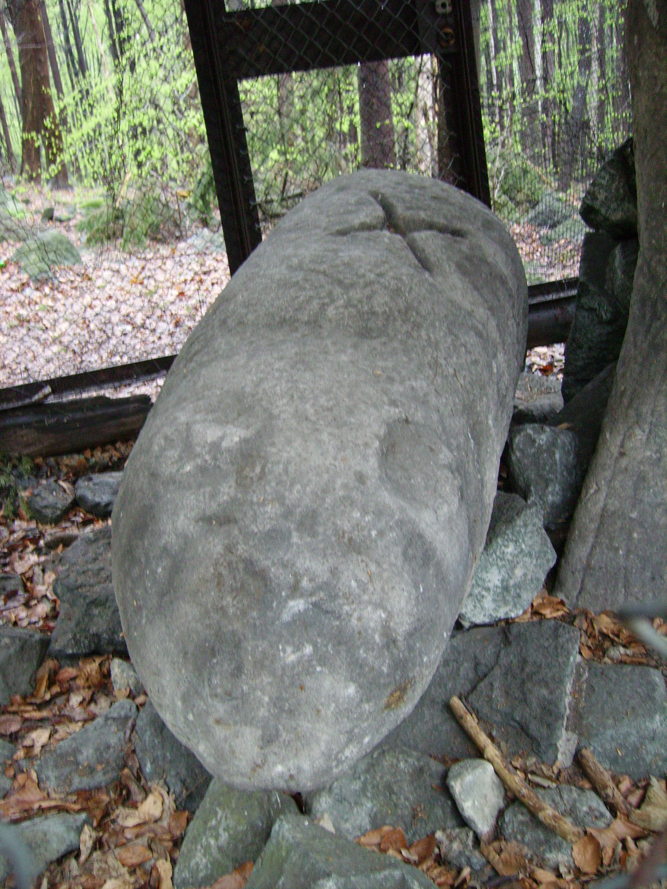 Ślęża - niedźwiedź krzyż solarny